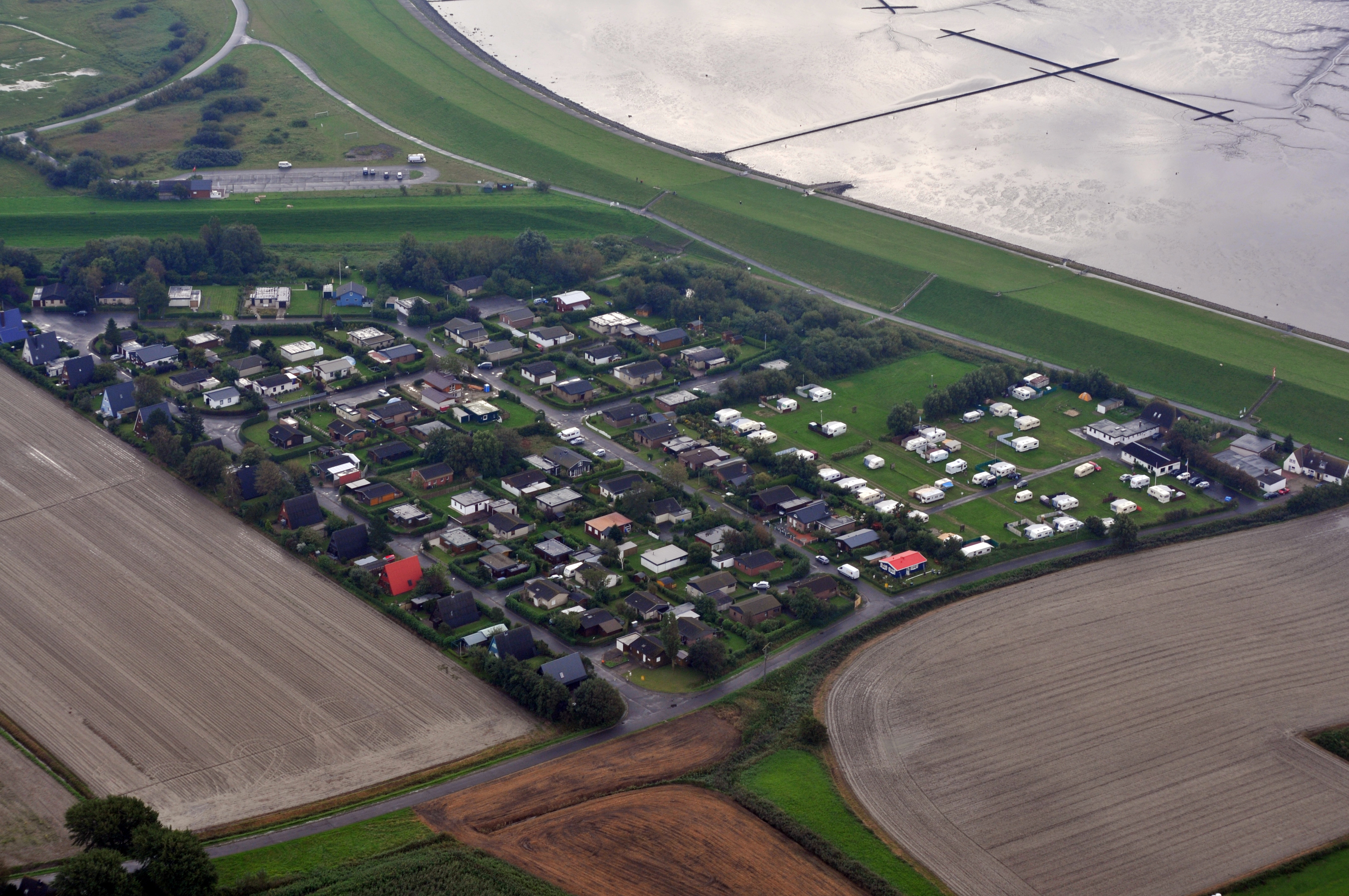 Fotoflug 4. Sept. 2011; Kretjenkoog, Warwerort, Kreis Dithmarschen, Schleswig-Holstein, Deutschland Dieses Foto entstand aufgrund eines Projektes, das von Wikimedia Deutschland e. V. gefördert wurde. Im Rahmen des „Community-Projektbudgets“ sollen Luftbilder u.a. von Inseln, Halligen, Sanden und Küstenorten der deutschen Nordseeküste angefertigt werden. Das Projekt „Fotoflüge“ wurde im September 2011 begonnen.